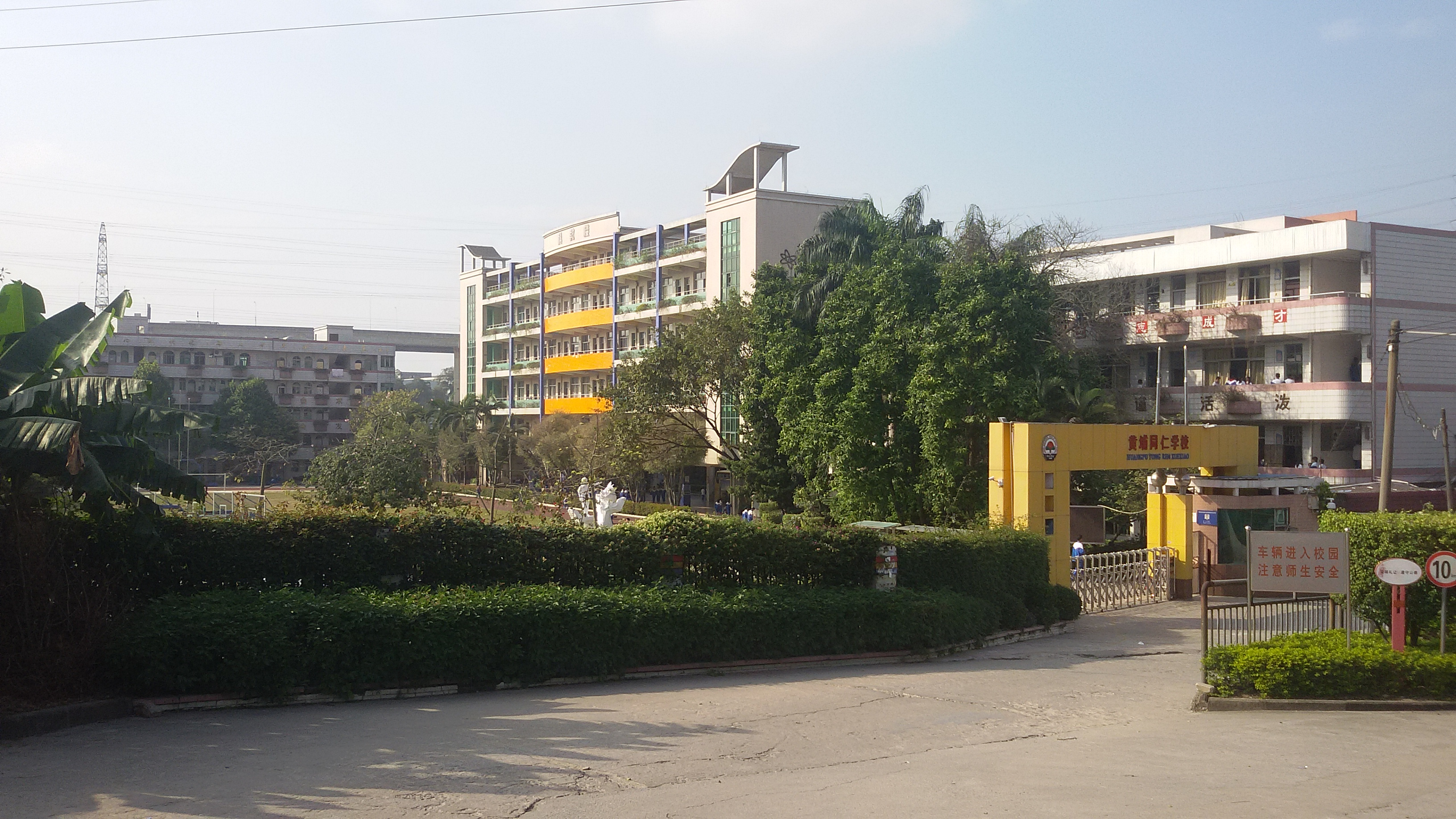 粵語: 黃埔同仁學校